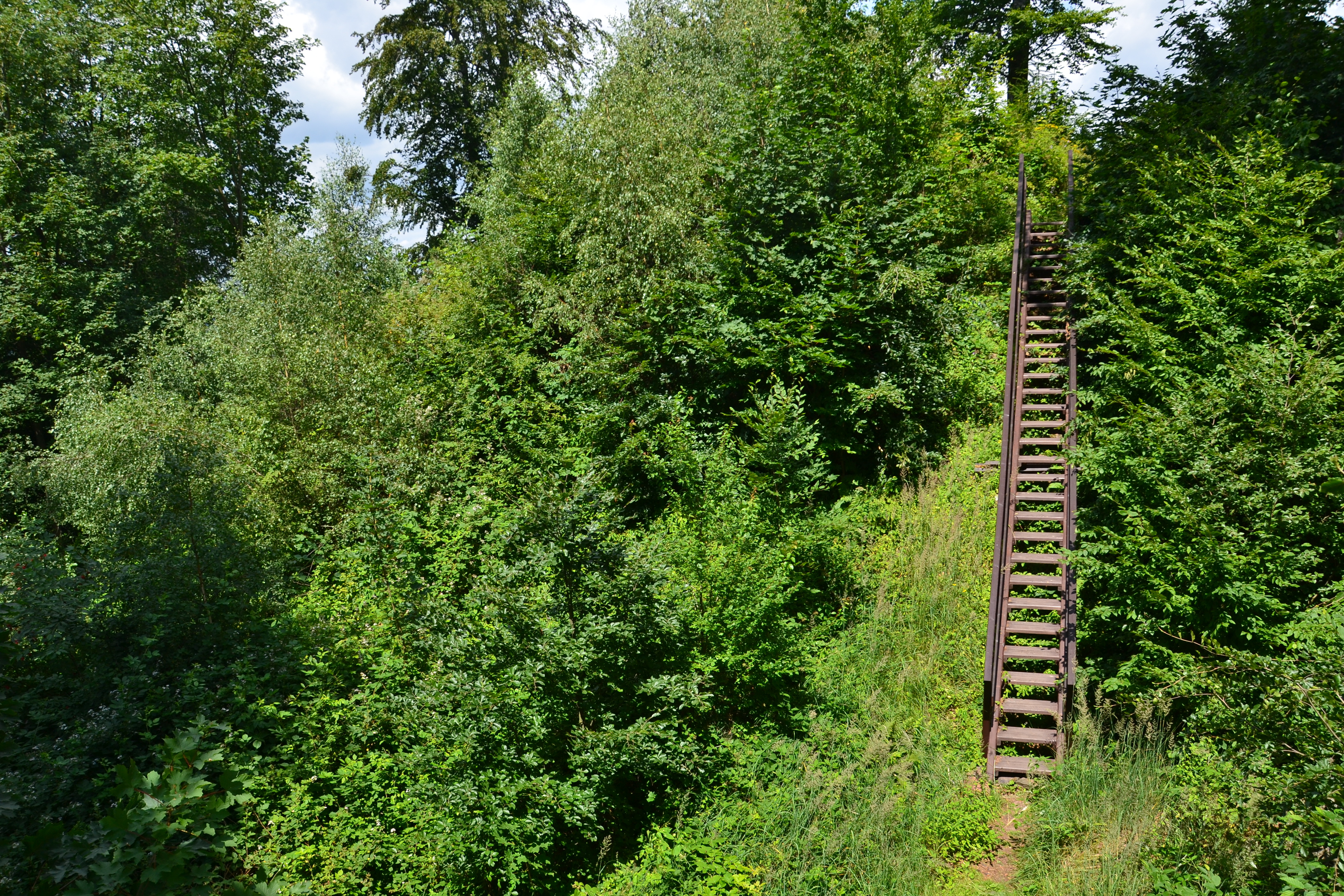 Hrad Velešov, zřícenina, Potštejn. Druhý příkop